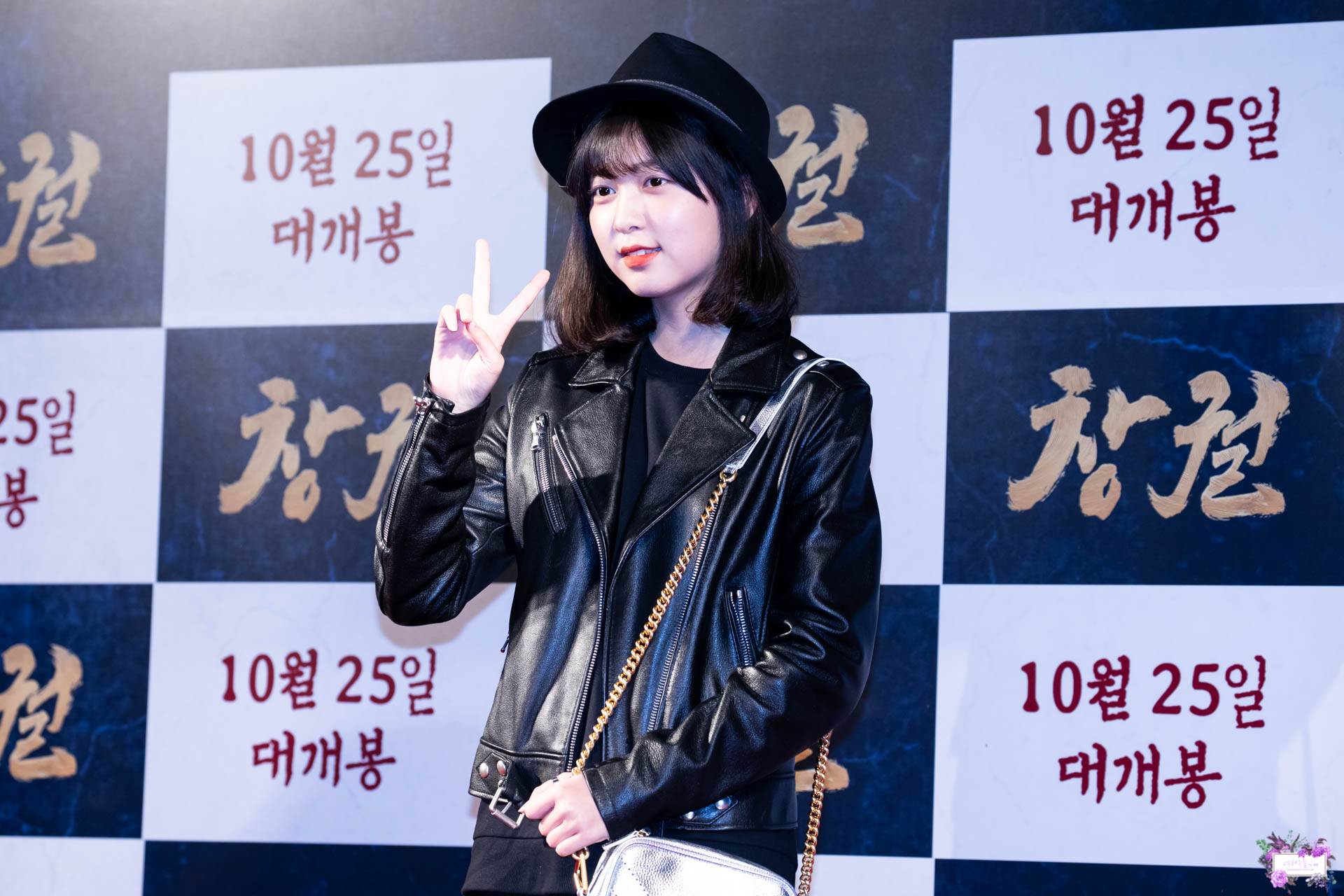 181018 창궐 VIP시사회 셀러브리티